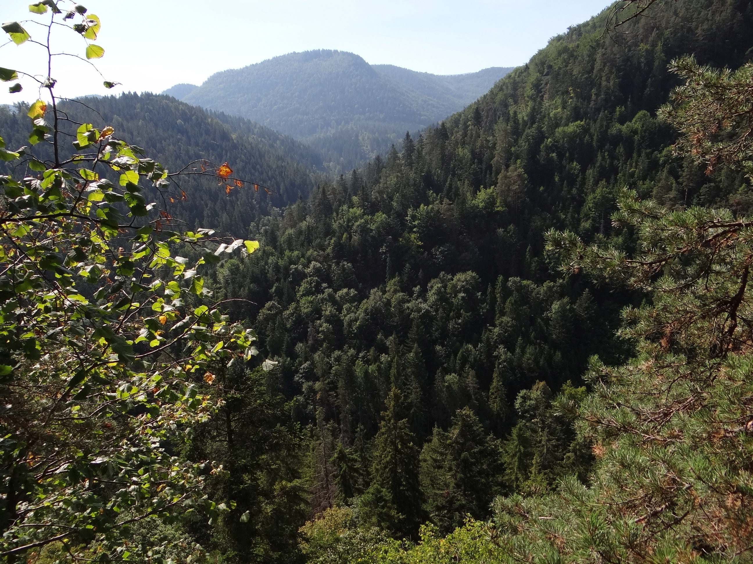 Biely potok (prítok Hornádu)